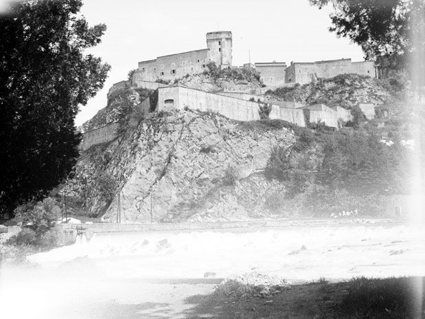 Fonds Trutat - Photographie ancienne Cote : TRU C 523 Localisation : Fonds ancien (S 30) Original non communicable Titre : Le château et la gare, Lourdes, 13 juillet 1906 Auteur : Trutat, Eugène Rôle de l'auteur : Photographe Lieu de création : : Lourdes (Hautes-Pyrénées) Date de création : : 1906 Mesures : : 9 x 12 cm Observations : Notes de la main de Trutat : "Goeszg Anschutz, Jougla b. bleue" Mot(s)-clé(s) : -- Ville -- Arbre -- Fortification -- Rempart -- Château -- Gare -- Rocher -- Eté -- Lourdes (Hautes-Pyrénées) -- Lourdes (Hautes-Pyrénées ; canton) -- Midi-Pyrénées (France) -- Pyrénées (France) -- 20e siècle, 1e quart -- 12e siècle Médium : Photographies -- Négatifs sur plaque de verre -- Noir et blanc -- Goerz-Anschutz -- Jougla-Lumière -- Paysages urbains Bibliothèque de Toulouse. Domaine public